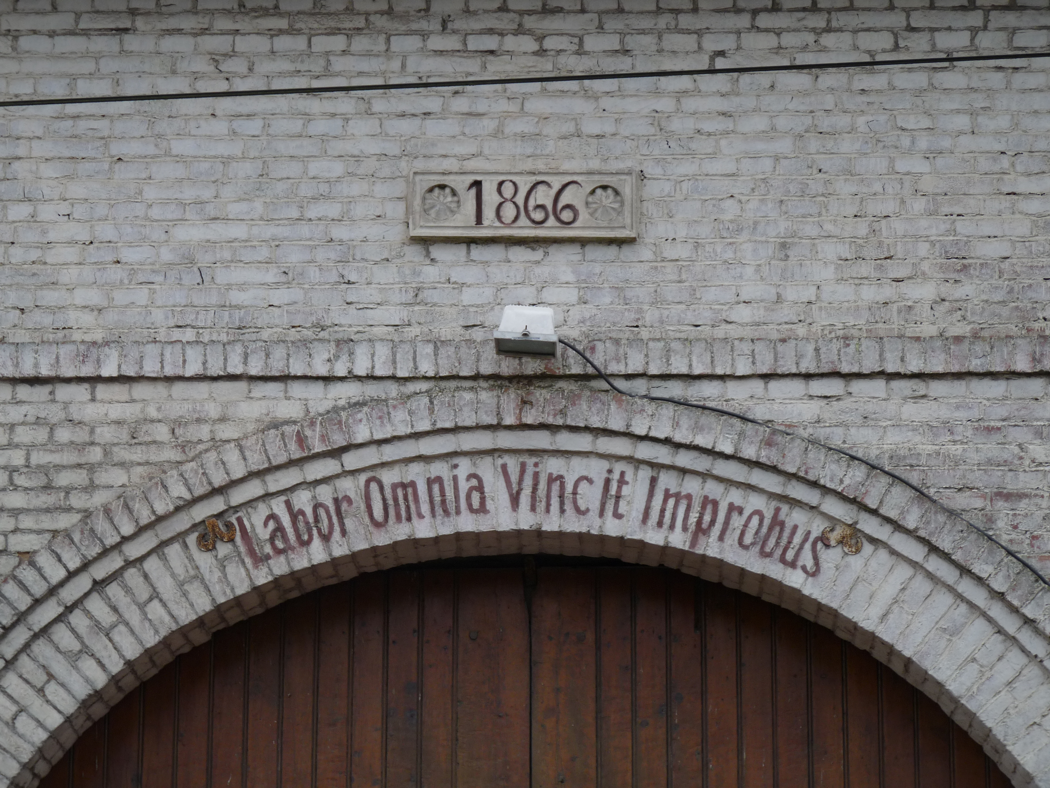 Porche de ferme "Labor Omnia Vincit Improbus"